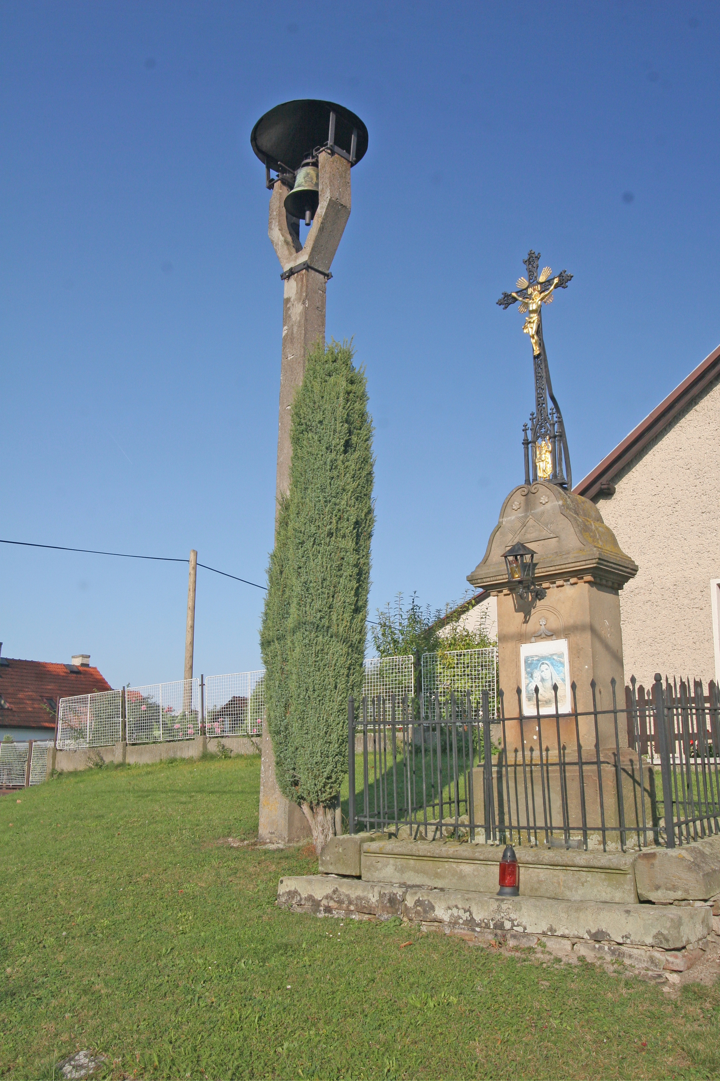 Rychnovek kříž